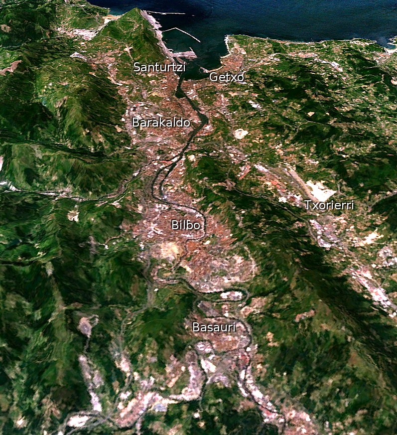 Bilboko itsasadarreko herri nagusiak; Bilbao, Spain